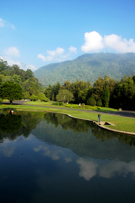 Kebun Raya Cibodas, Jawa Barat, Indonesia